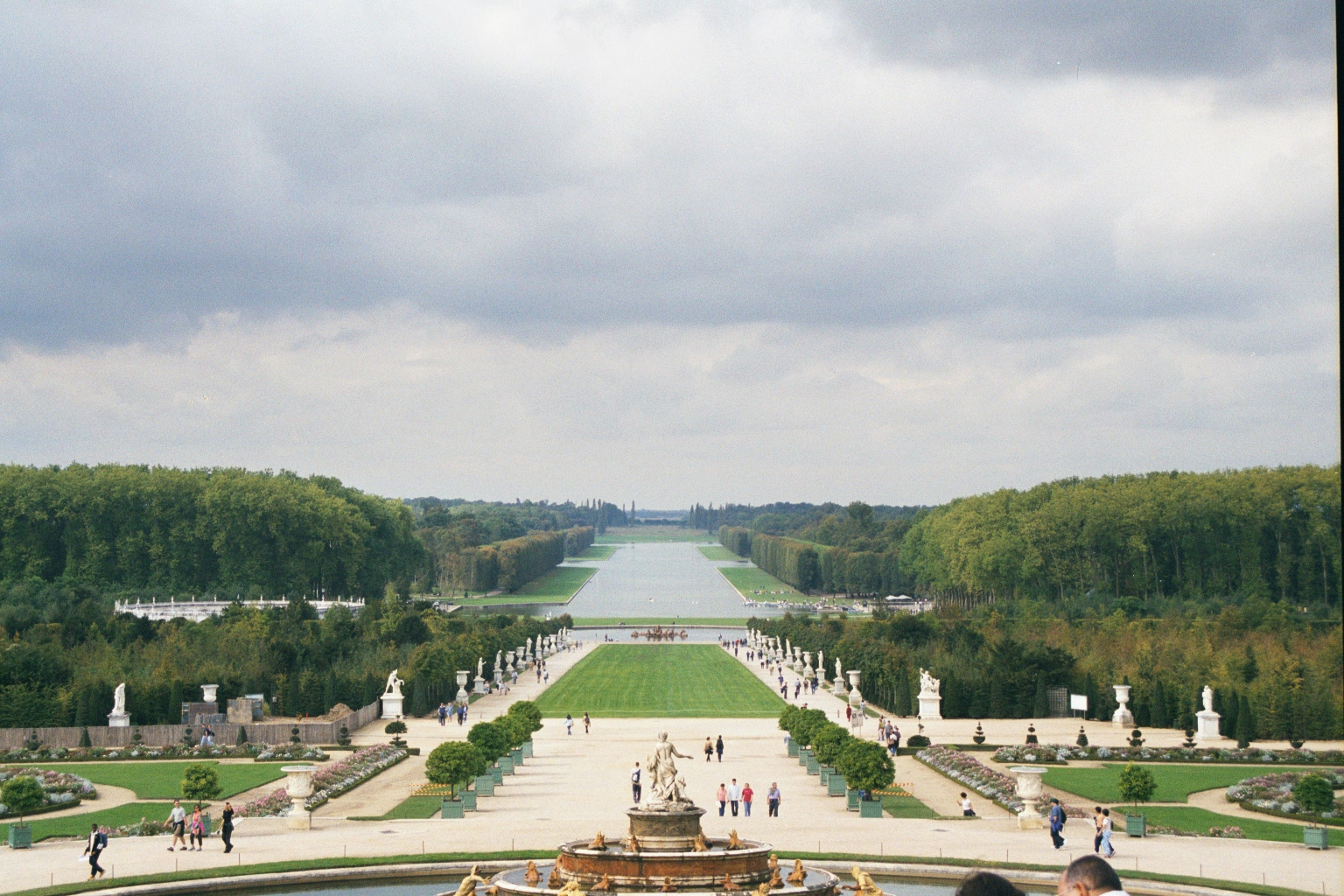 Parterre et Bassin de Latone, Allée Royale dite aussi Tapis Vert et Grand Canal dans les jardins du Château de Versailles, Yvelines, France.